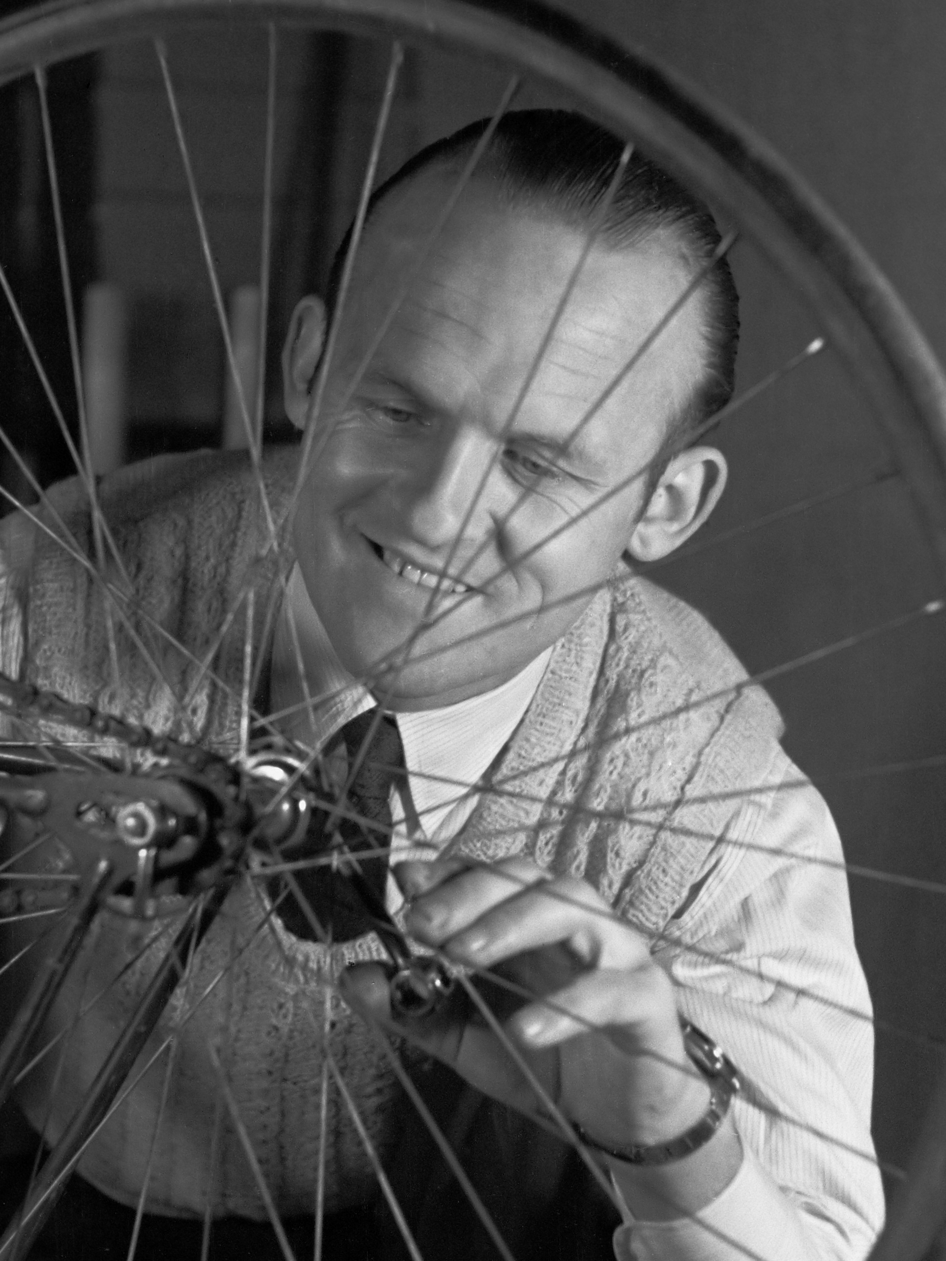 Frans Slaats, oud-baanwielrenner 19 november 1945